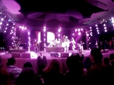 Trazendo a Arca no Adora Heavens, em 2011.